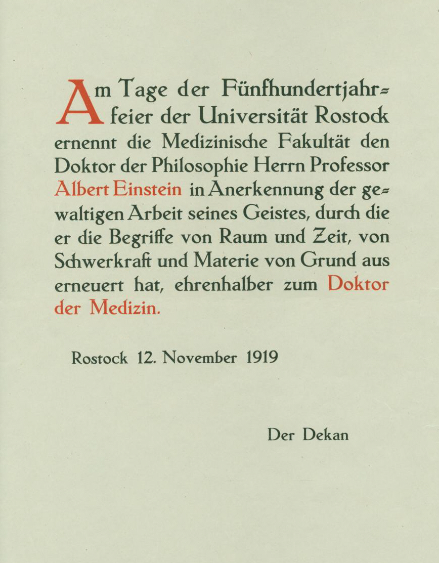 Ehrenpromotionsurkunde Albert Einsteins